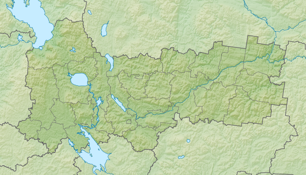 Физическая карта Вологодской областиРавноугольная проекция. Координаты краёв: север — 62.0° С юг — 58.0° С запад — 34.0° В восток — 48.0° В